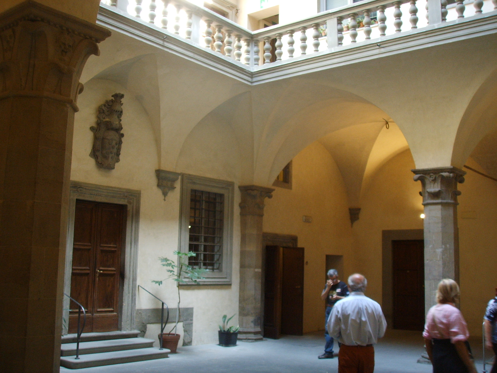 Palazzo corsini suarez, cortile